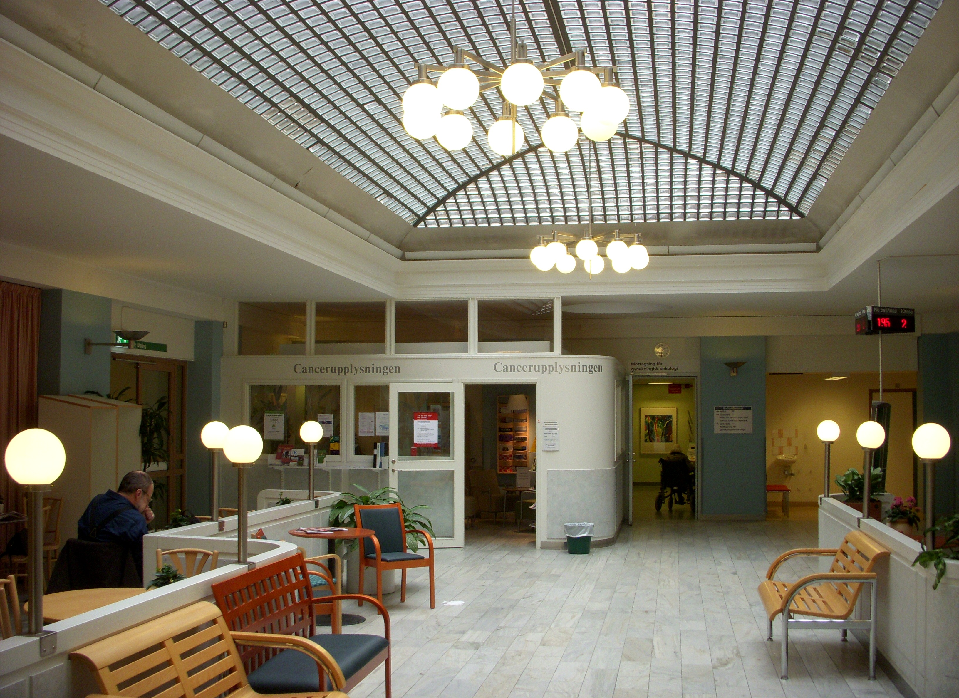 Väntrummet och reception i Radiumhemmet, Solna